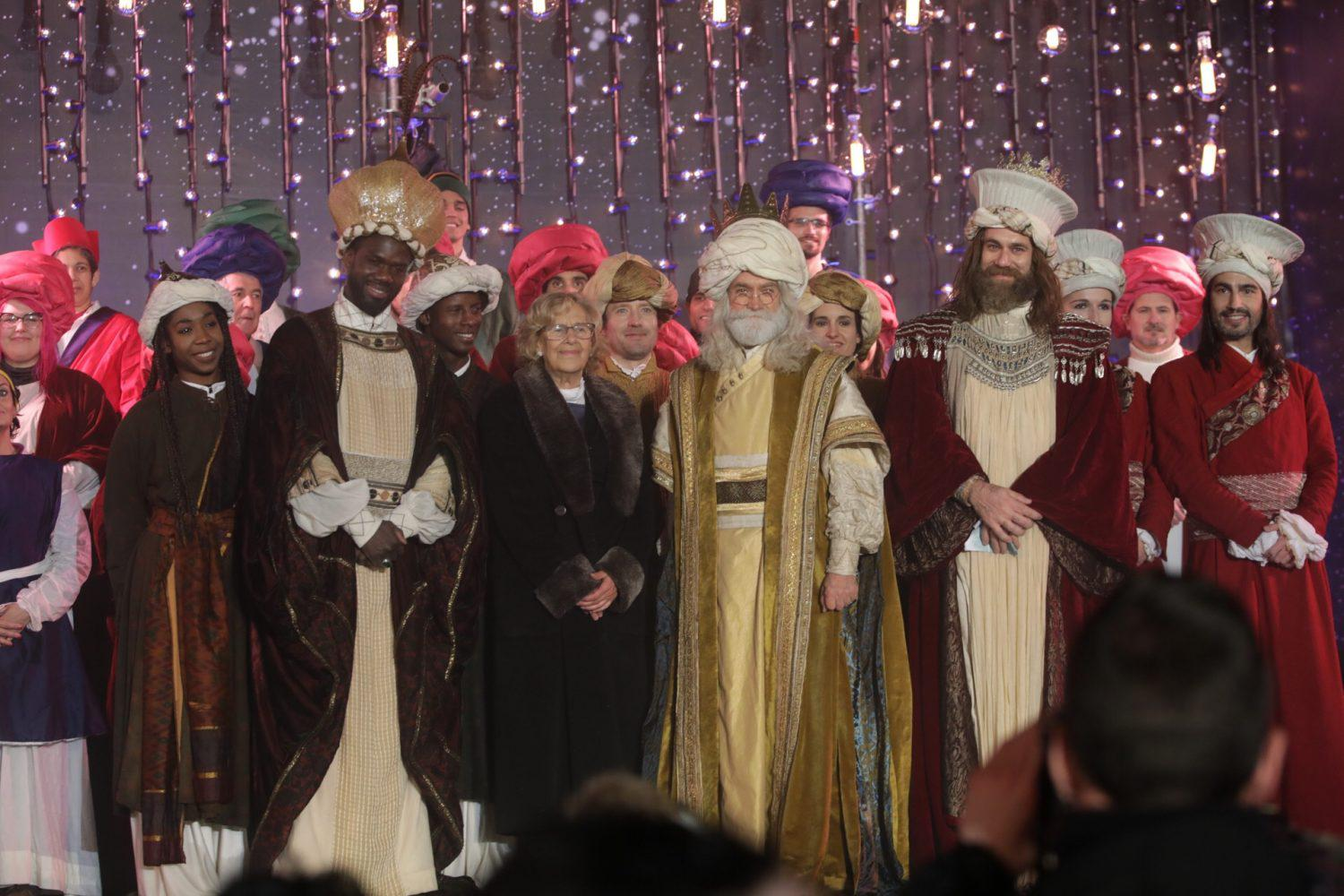 Y llegó el gran día para todas las niñas y niños: La Cabalgata de Reyes ya está en Madrid. Después de viajar desde muy lejos, el cortejo de sus majestades Melchor, Gaspar y Baltasar ha recorrido el centro de la ciudad, precedido por ‘La Estrella de la Navidad’, una carroza cargada de más de 6.000 deseos escritos en estrellas de papel por los ciudadanos creando una galaxia colectiva de anhelos para el presente y el futuro.